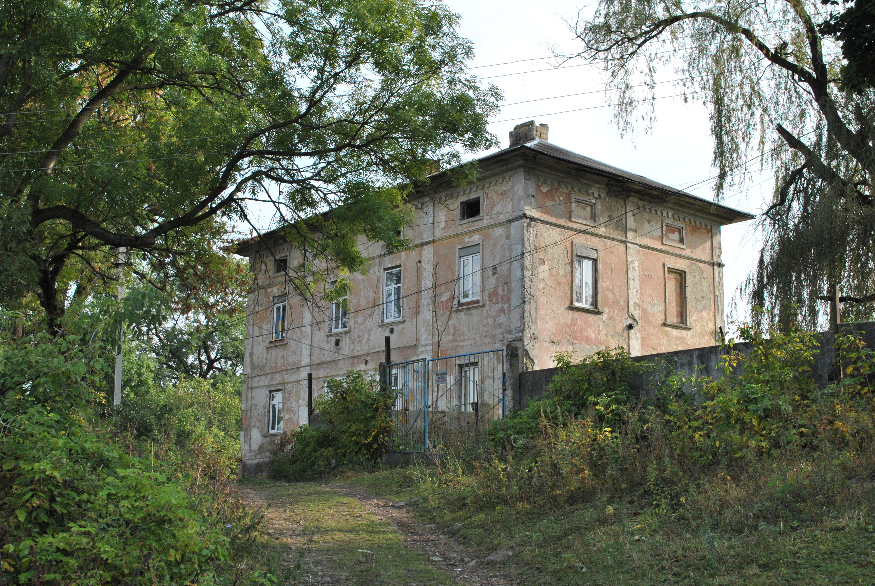 Бурса-гуртожиток (мурований), Бучач, вул. Хмельницького, 9.